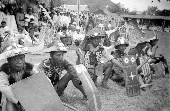 Negatief. Toradja's in oorlogstenue ter gelegenheid van het huwelijk van prinses Juliana